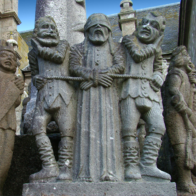 Église Notre-Dame, Saint-Thégonnec, Finistère, Bretagne, France. Détail du calvaire: le "Christ aux outrages".